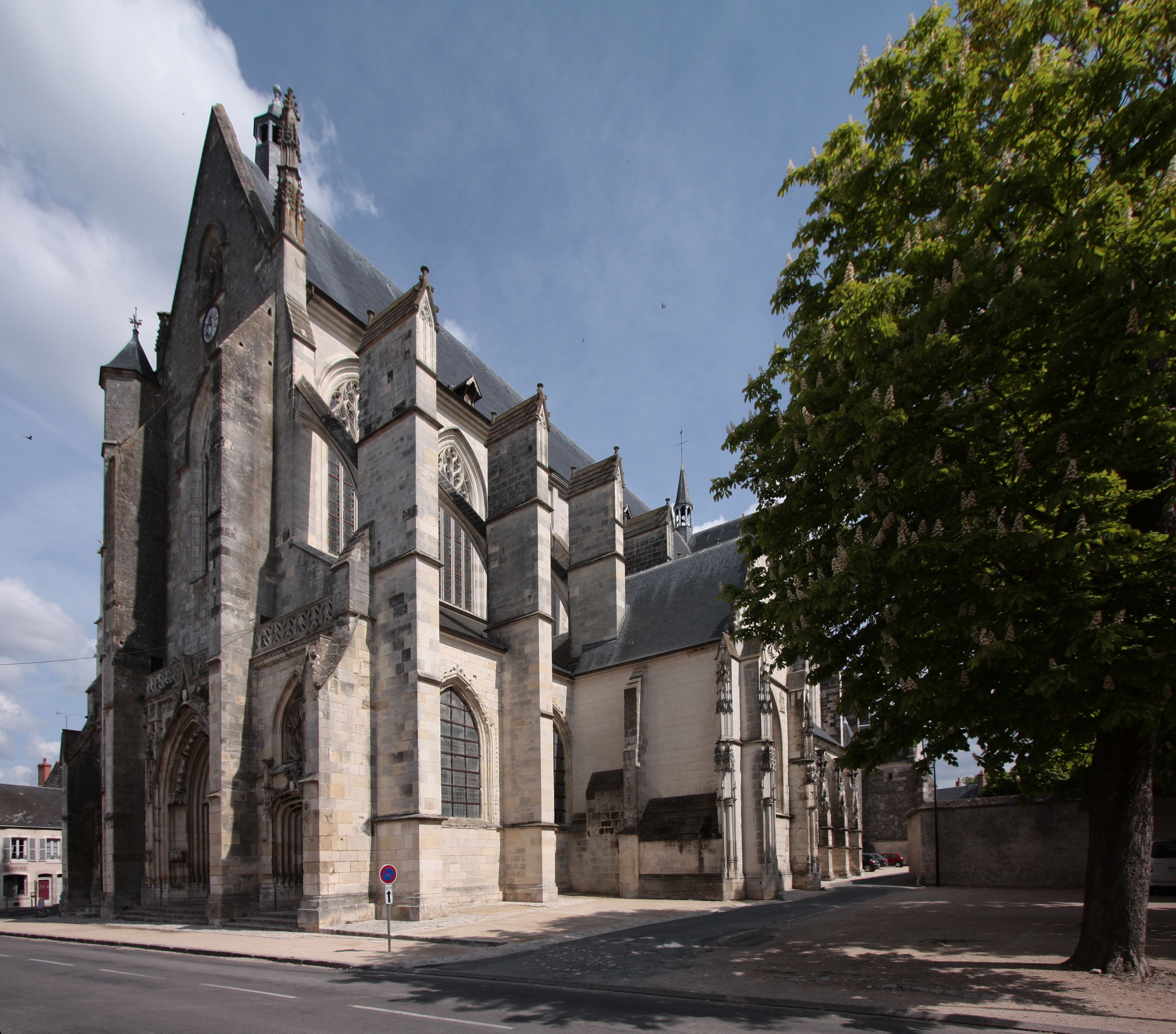 Kirche Notre-Dame de Cléry in der Gemeine Cléry-Saint-André, Département Loiret/Frankreich - Ansicht von Südwesten